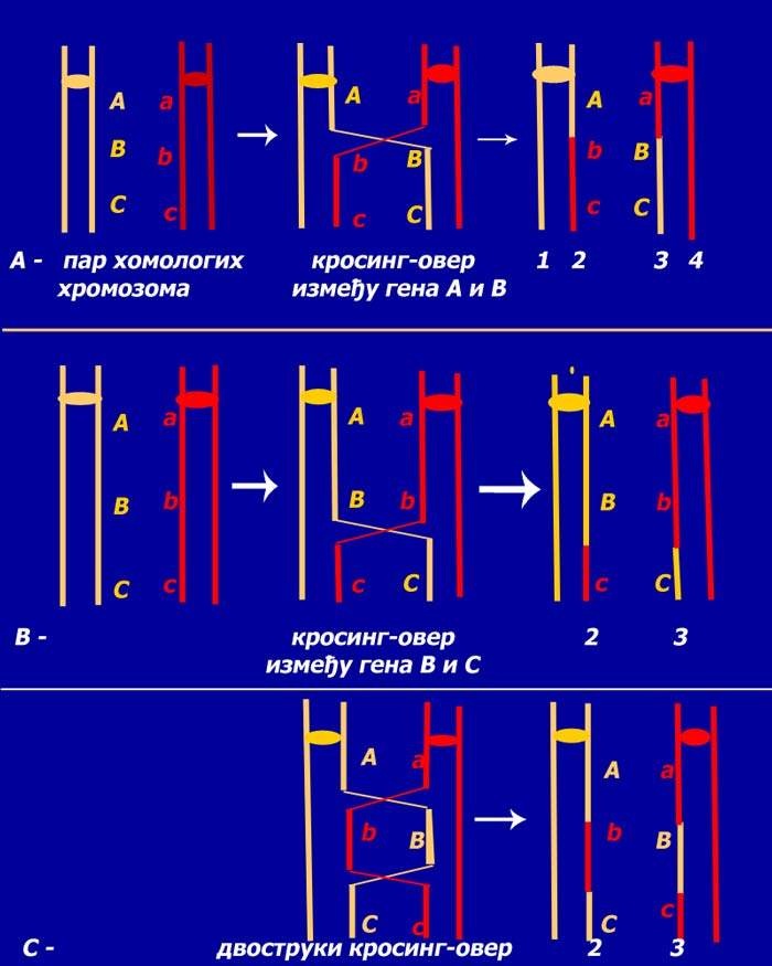 аутор: Снежана Трифуновић